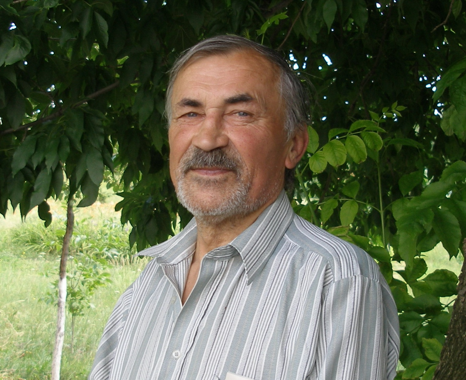 7.11. 1946 - 06.05.2020 — український письменник, журналіст, перекладач, краєзнавець, громадський діяч. , с. Весела Гора, Луганська область